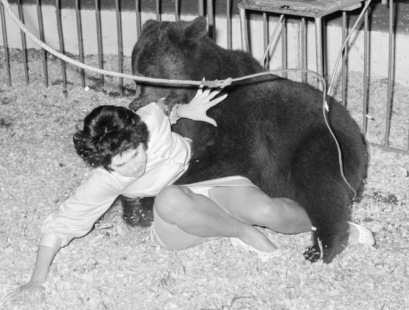 In 1962 wint Cees de Boer de prestigieuze World Press Photo in de categorie nieuws. Hij wint de prijs met een foto van zangeres Ria Kuyken die tijdens een generale repetitie in Circus Toni Boltini wordt aangevallen door een beer. Dit is de reeks foto's die voor en na de aanval zijn genomen